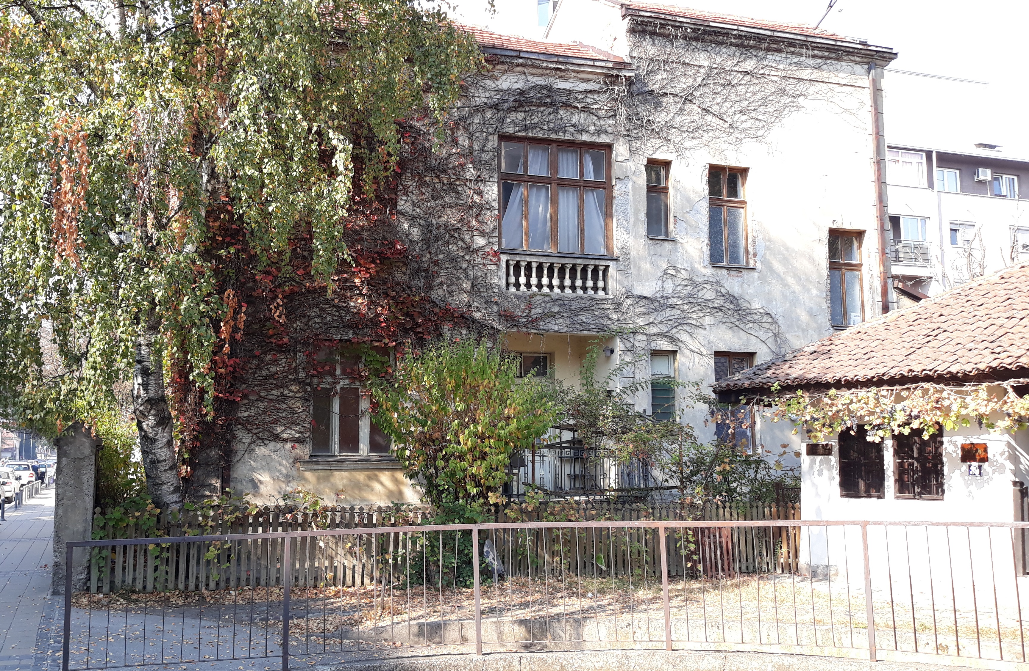 Новаковића кућа у Краљеву налази се у Улици Цара Душана, на броју 37.